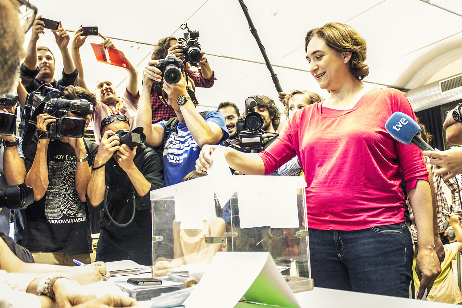 Ada Colau votant a les eleccions locals de Barcelona del 24 de maig, enrevoltada de periodistes.